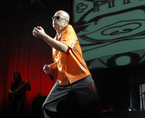 Carlos "el Indio" Solari, ex vocalista y compositor del grupo de rock argentino Patricio Rey y sus Redonditos de Ricota, durante su primera presentación solista, en el Estadio Ciudad de La Plata, en noviembre de 2005.